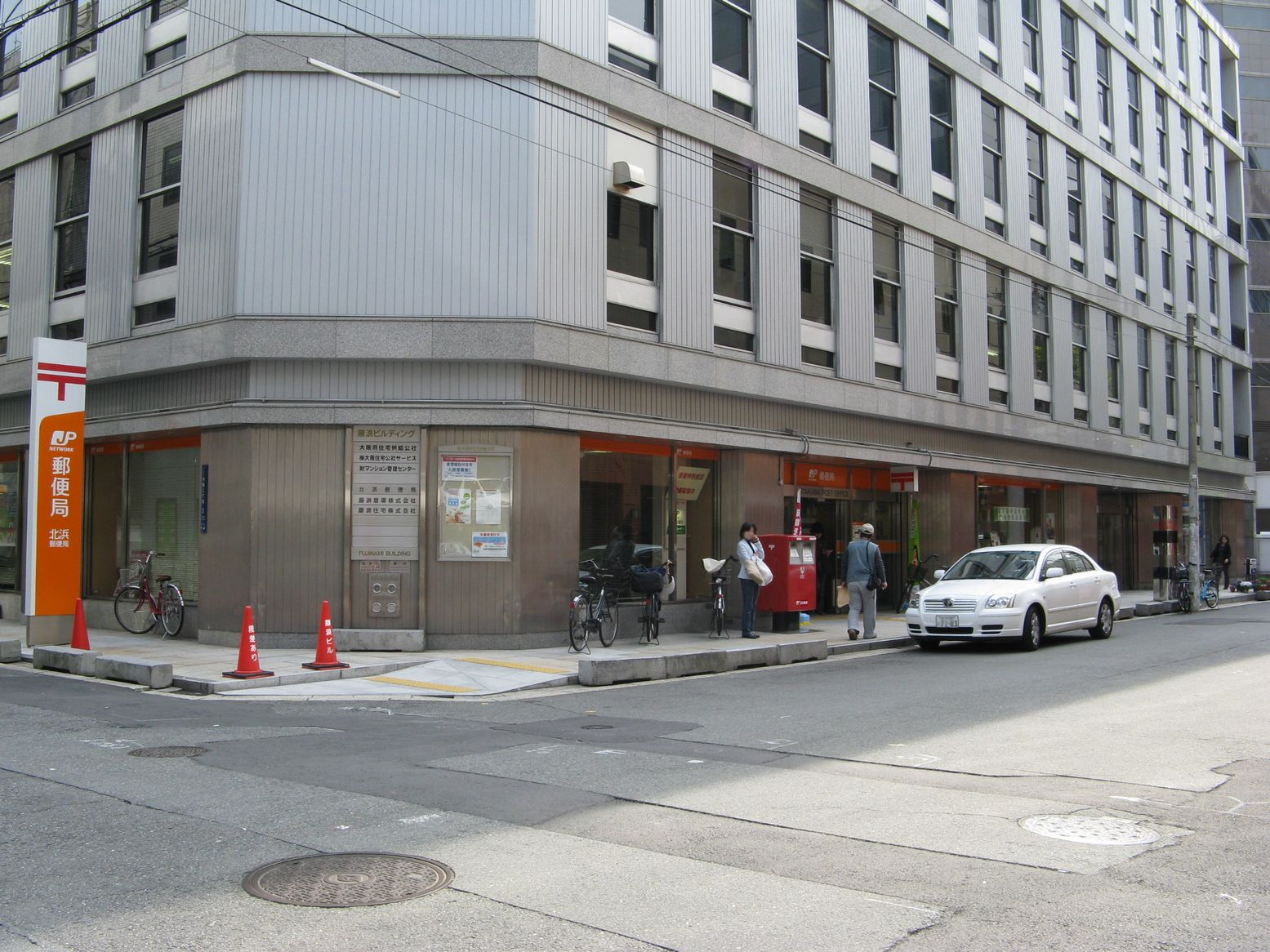 北浜郵便局